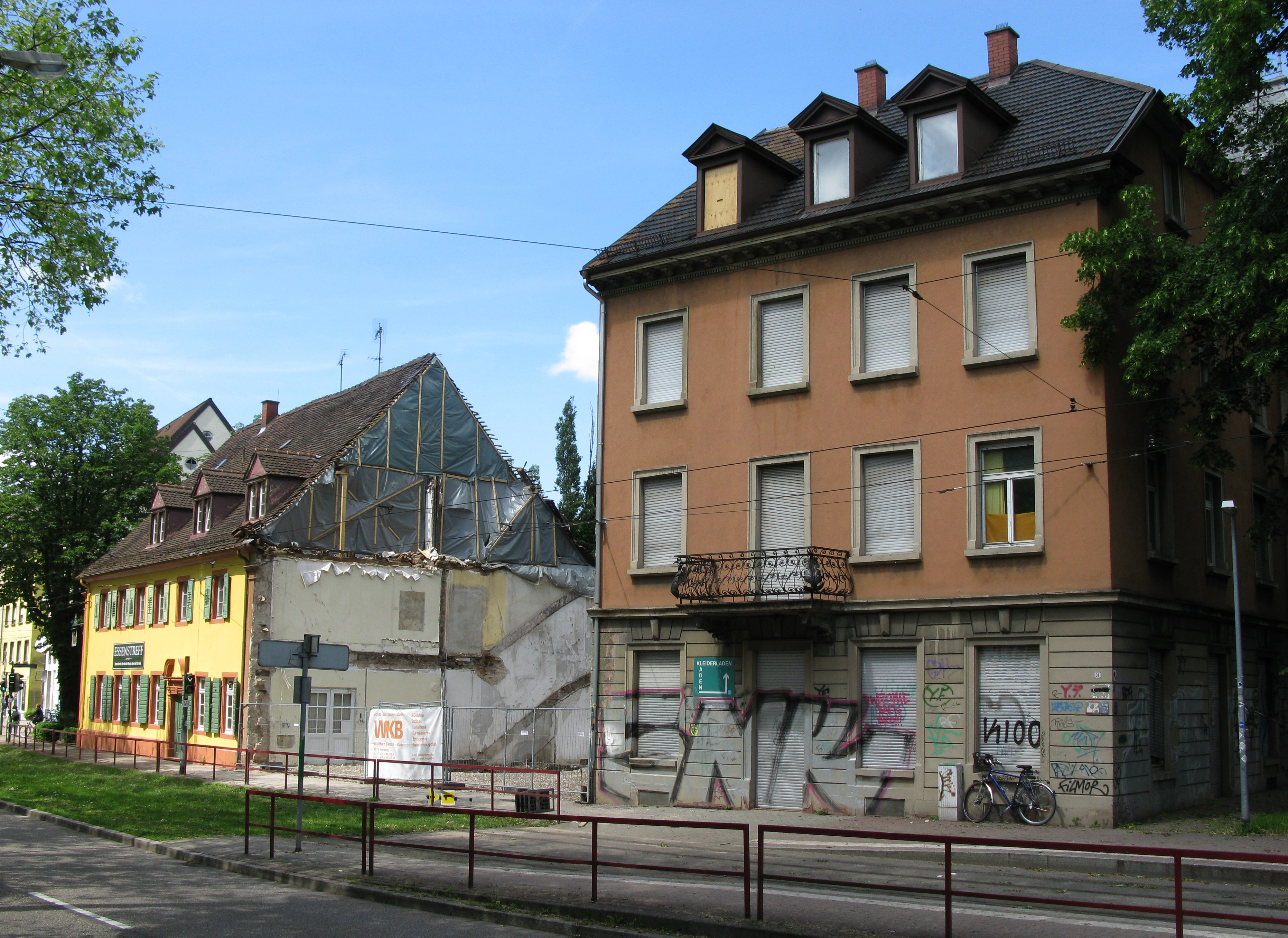 Dreikönigshaus in Freiburg, nach einem Brand musste der Mittelteil abgerissen werden